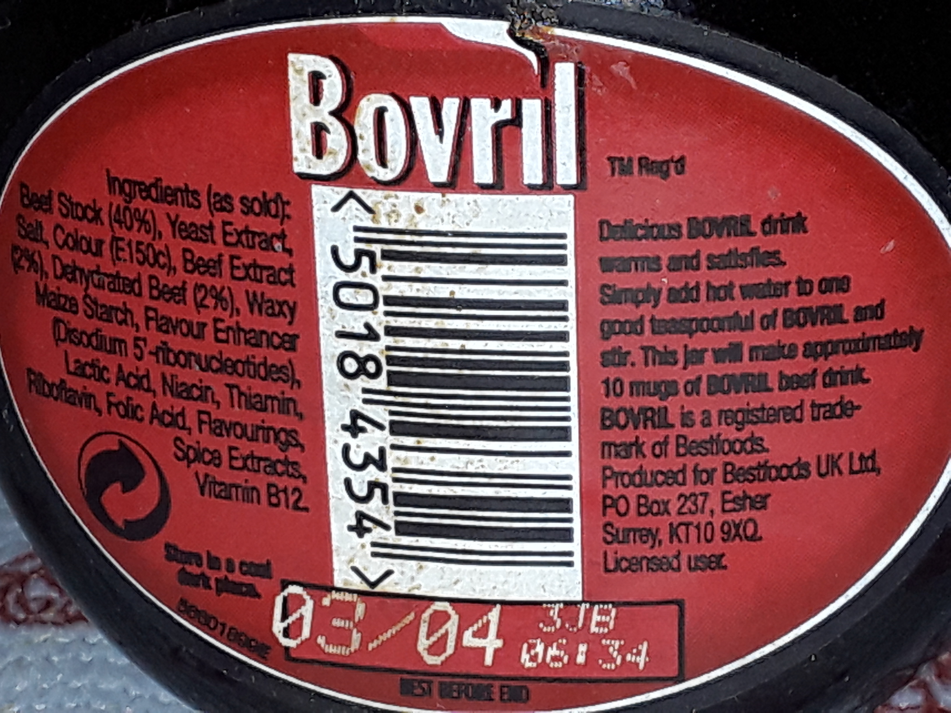 Bovril